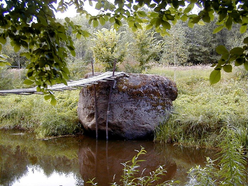 Velna skroderis - laukakmens Kujas upē 2001-08-25